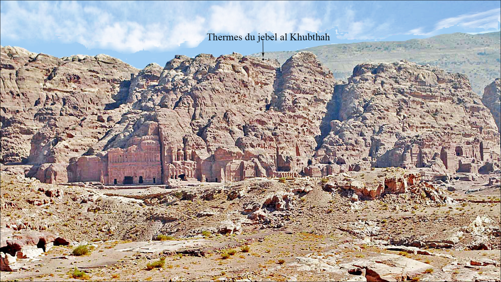 Le djebel Umm al Khubthah depuis le djebel al Biyara, avec vue du centre-ville de Pétra. Vue vers l'est.